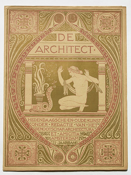 De Architect, verenigingsblad Architectura et Amicitia. 21e jrg nr. 4, 1913. Uitgeverij: N.V. Maatschappij (...) De Architect